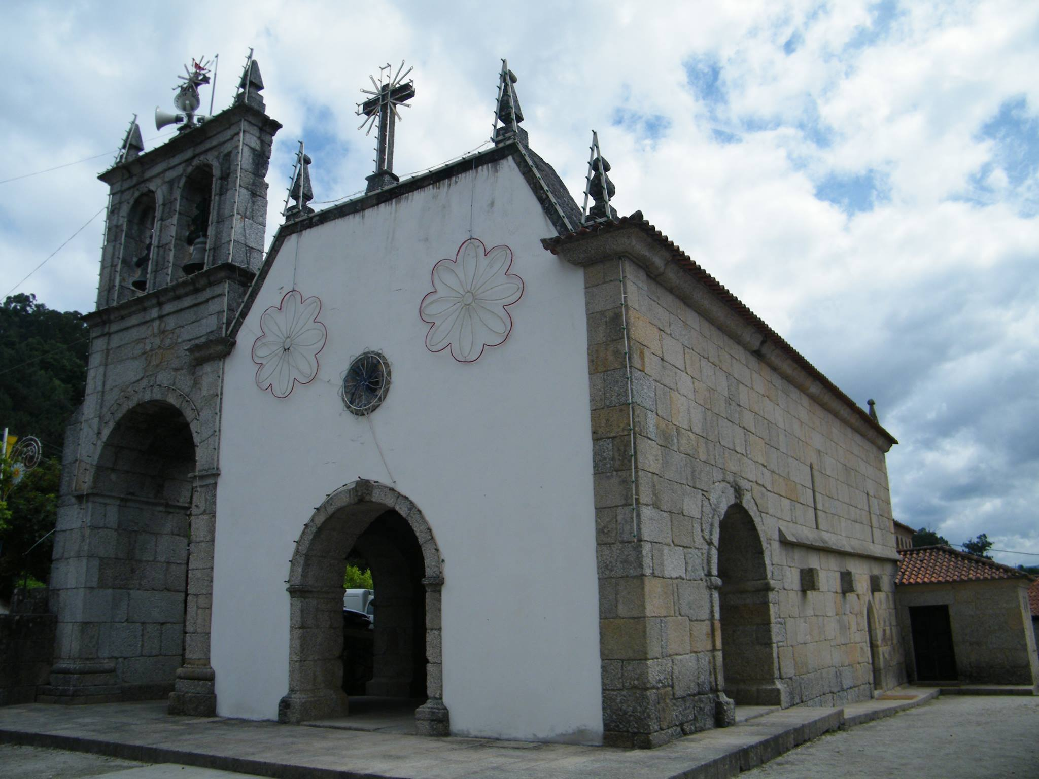 Amarante Gatão Igreja Românica